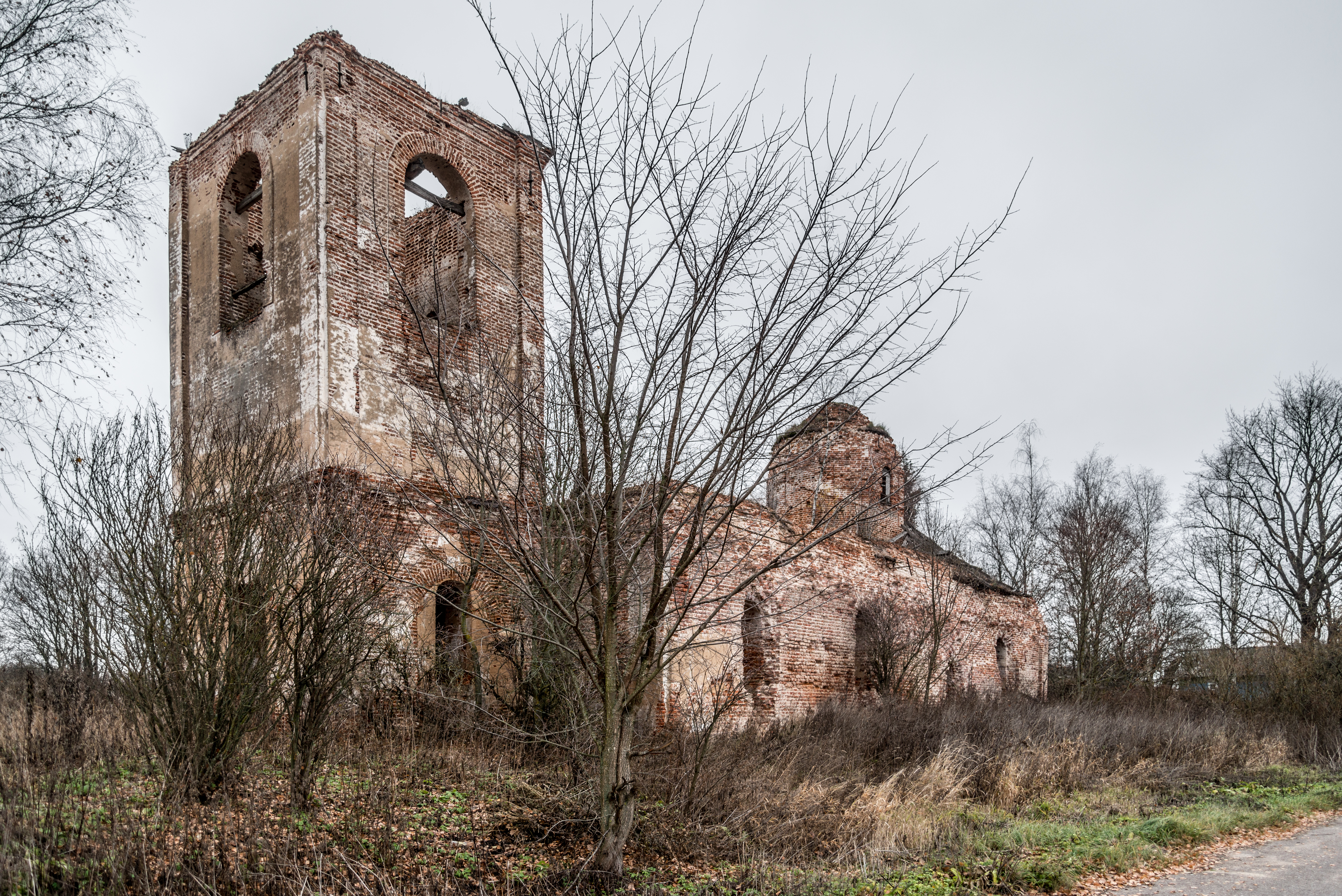 Церковь Николы: Сусловичи, Краснинский район, Смоленская область